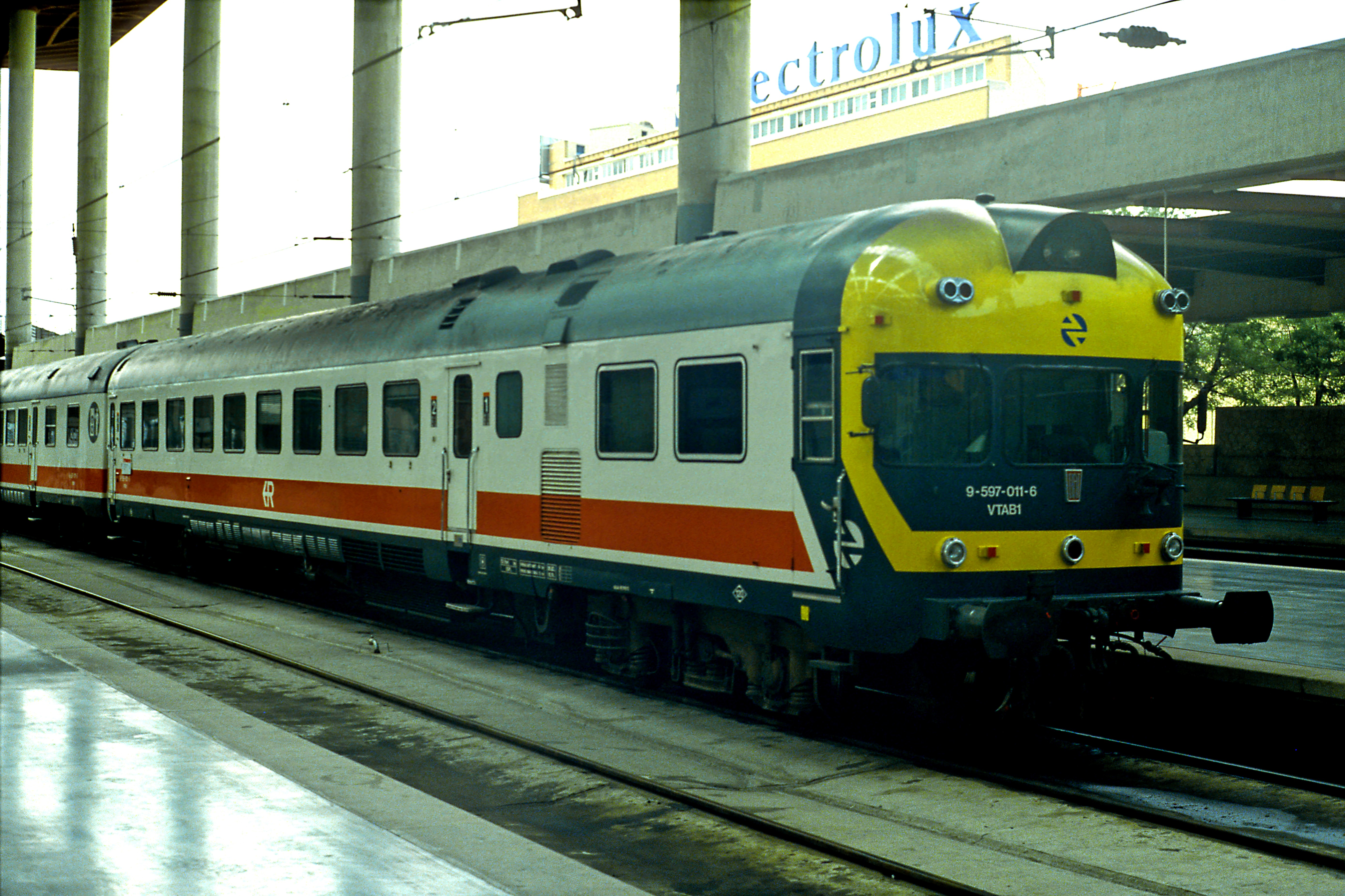 Fiat-Triebzug im Einsatz als Expreso Regional in der Fernbahnhalle (Breitspur). Breitspurbetrieb gab es hier nur bis zur Inbetriebnahme der Schnellfahrstrecke Madrid–Barcelona, mit deren Bau wurden alle Bahnsteiggleise in dieser Halle auf Regelspur umgbaut.